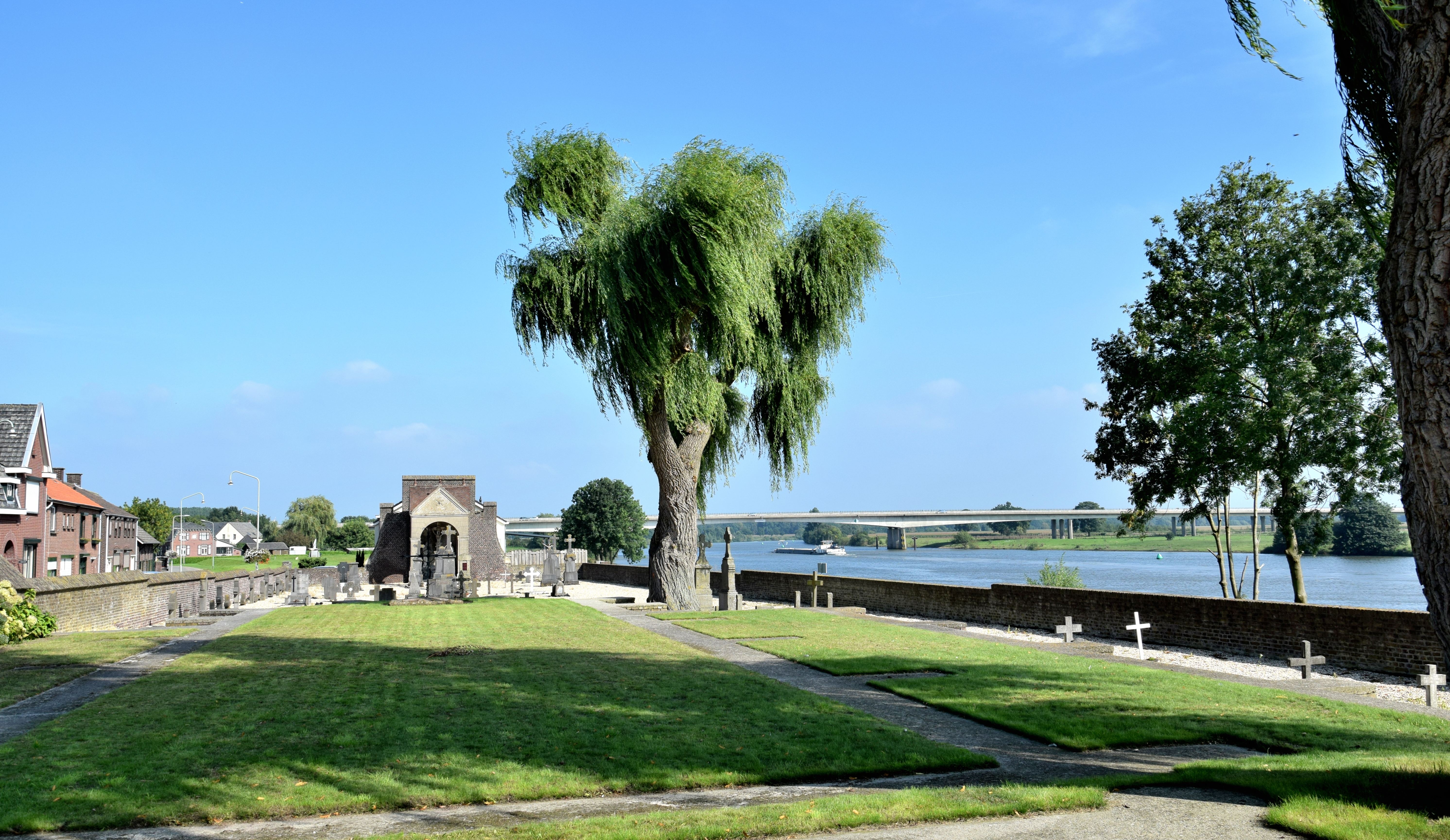 Photo was taken from outside through the bars of the iron gate, 'cause the gate was closed.